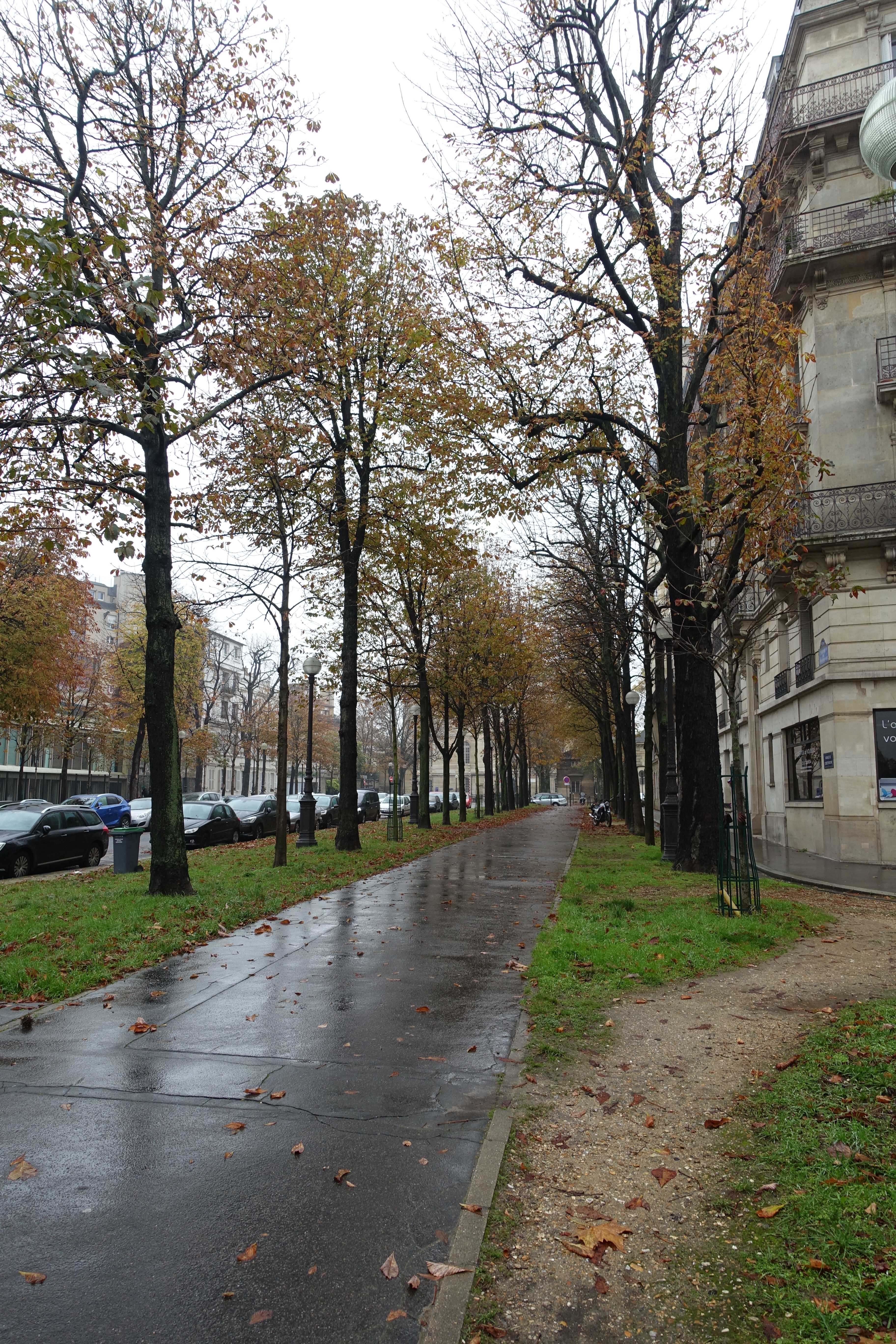 Paris